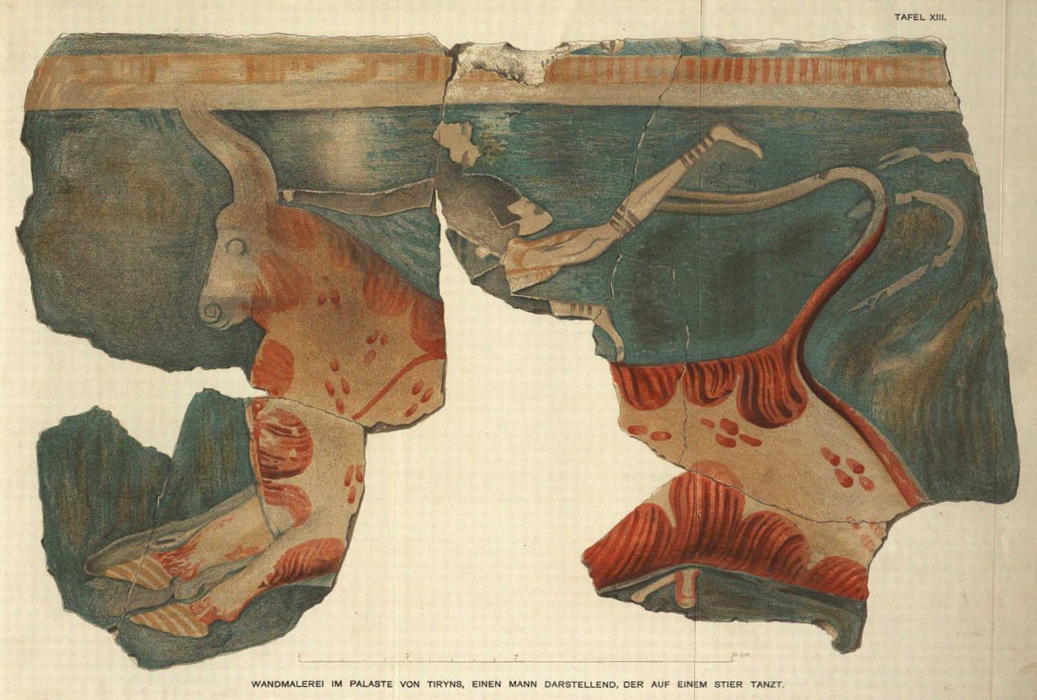 Wandmalerei im Palaste von Tiryns, einen Mann darstellend, der auf einem Stier tanzt.